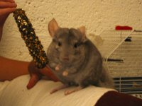 Domestic chinchilla